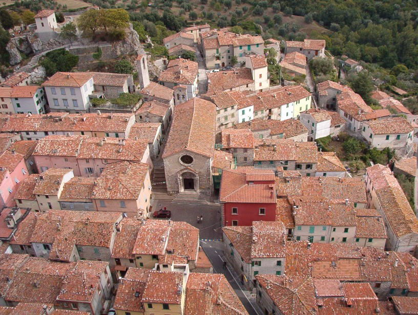 Roccalbegna, chiesa dei santi pietro e paolo, veduta dalla rocca